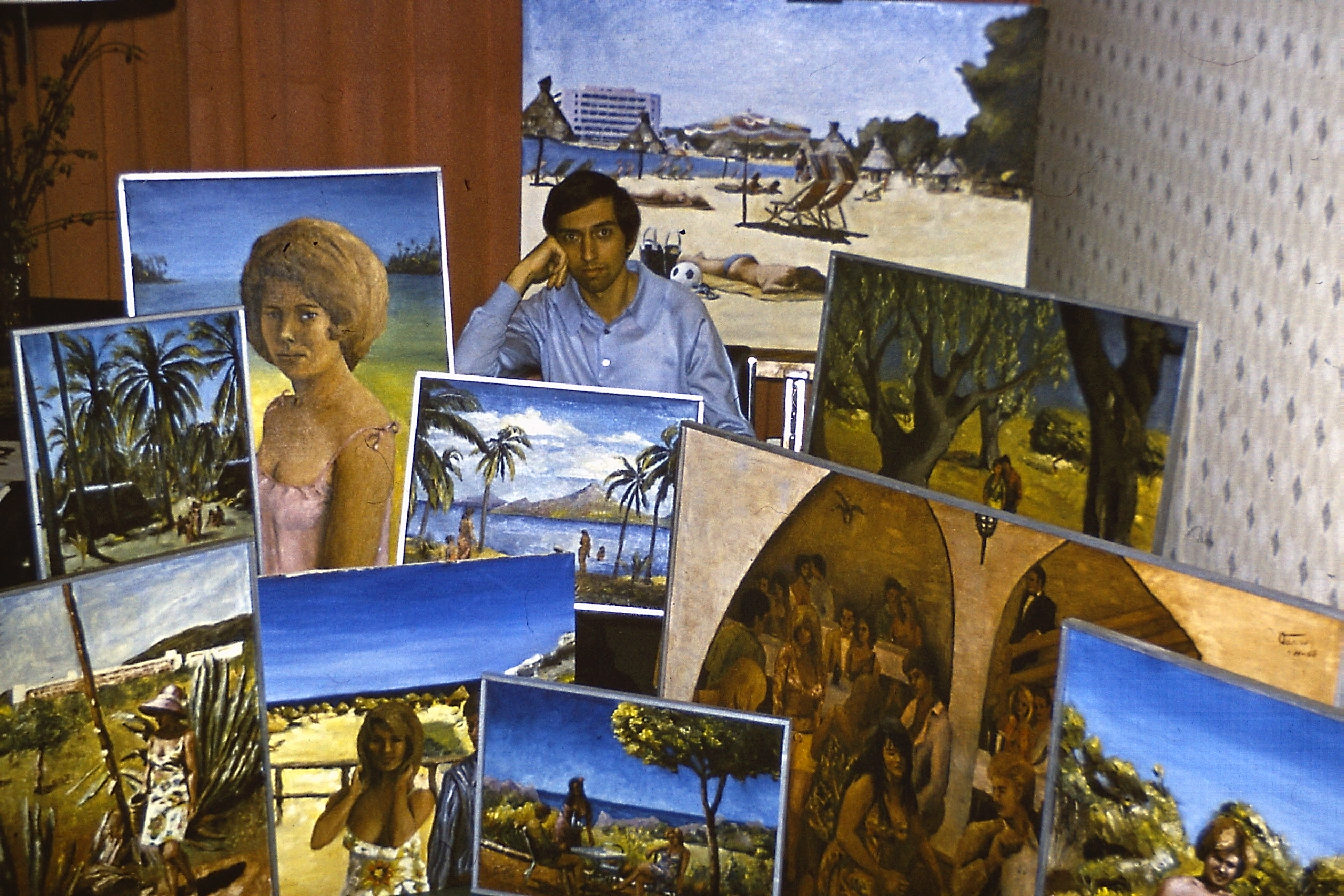 Oeuvres